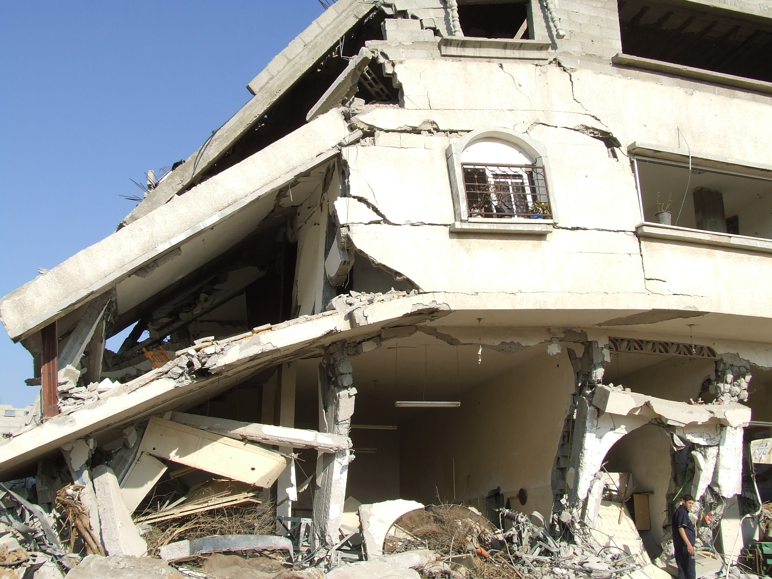 Massive destruction